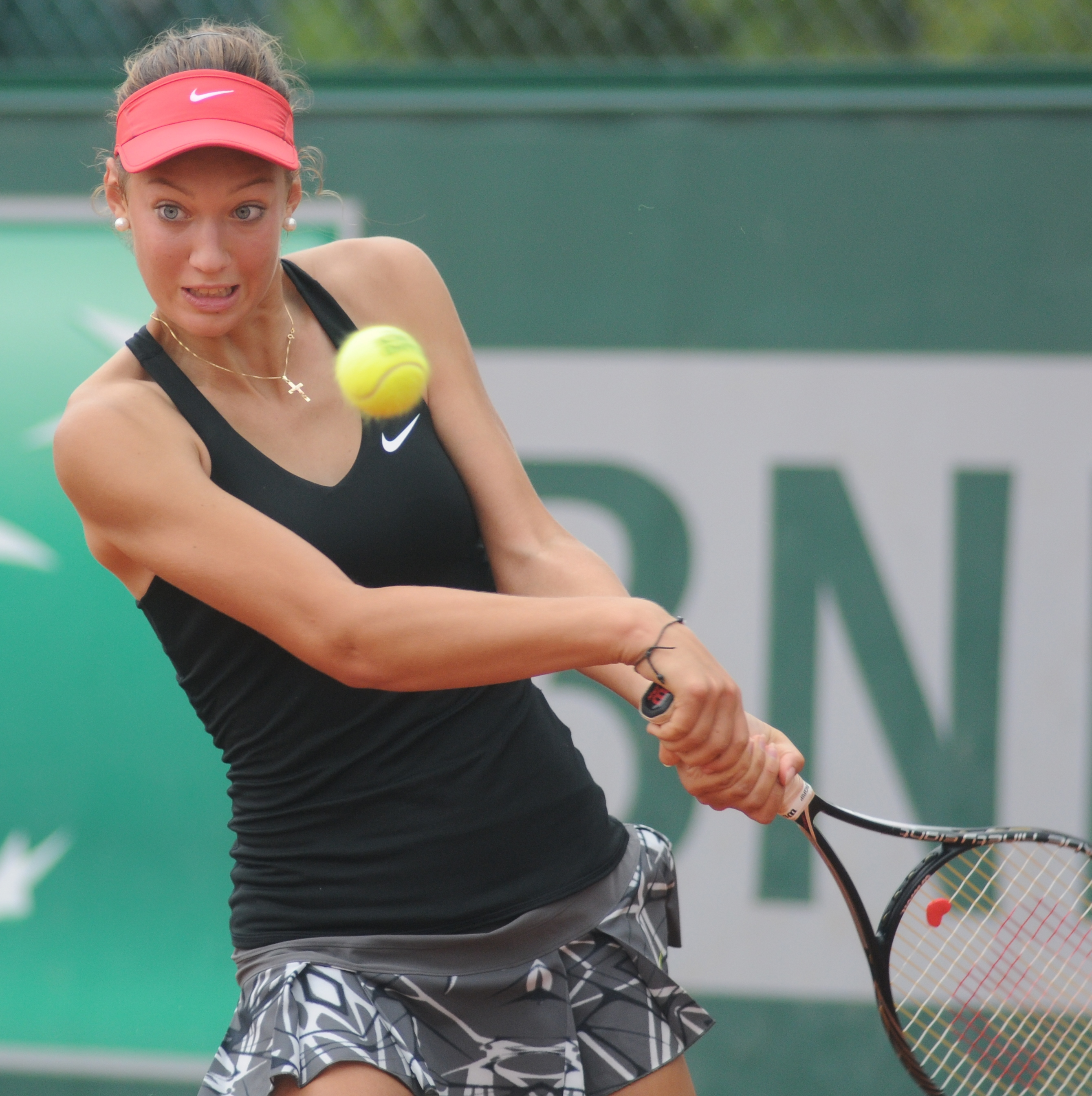 Tereza Mihalíková at the 2014 French Open